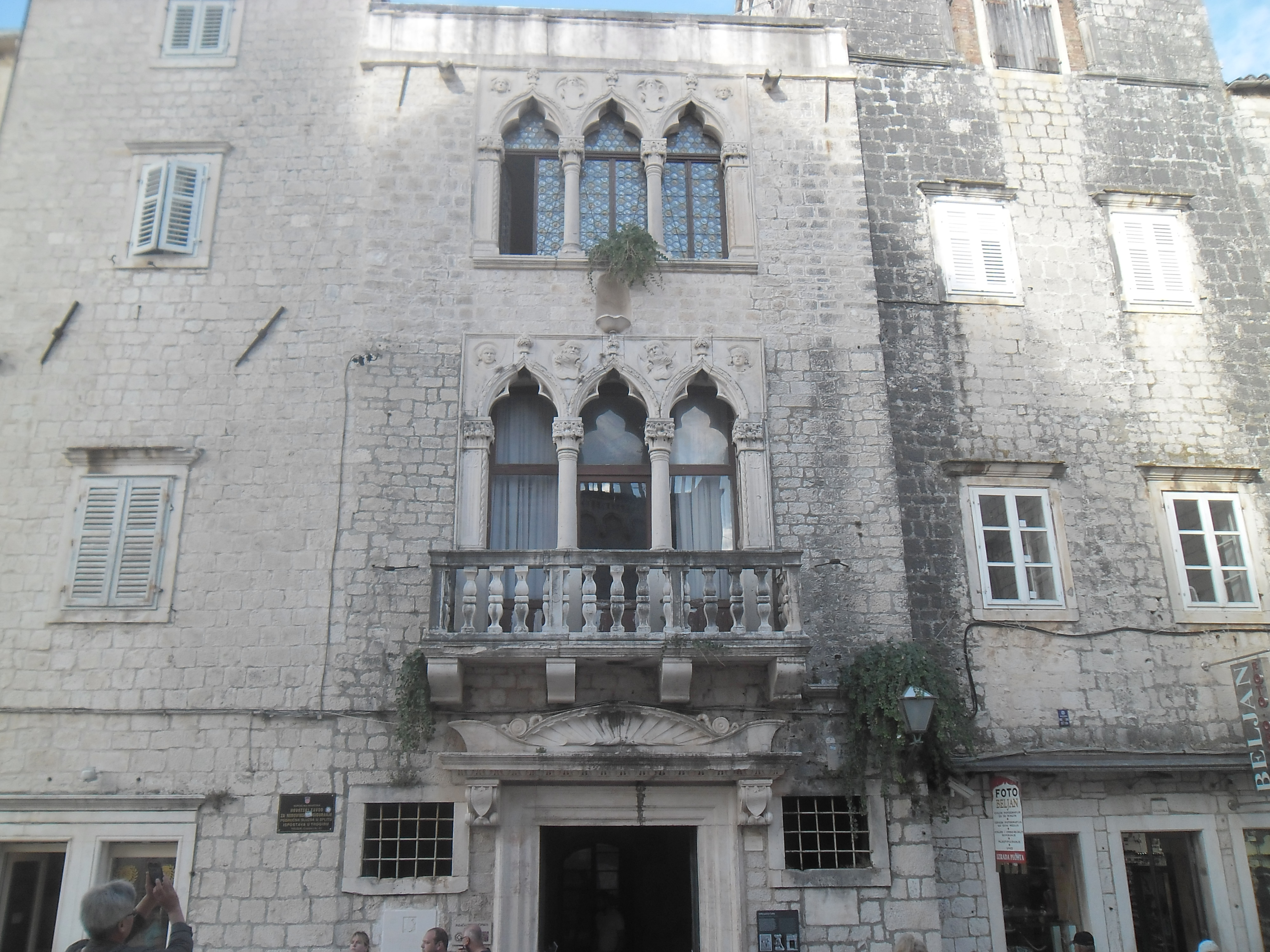 Trogir